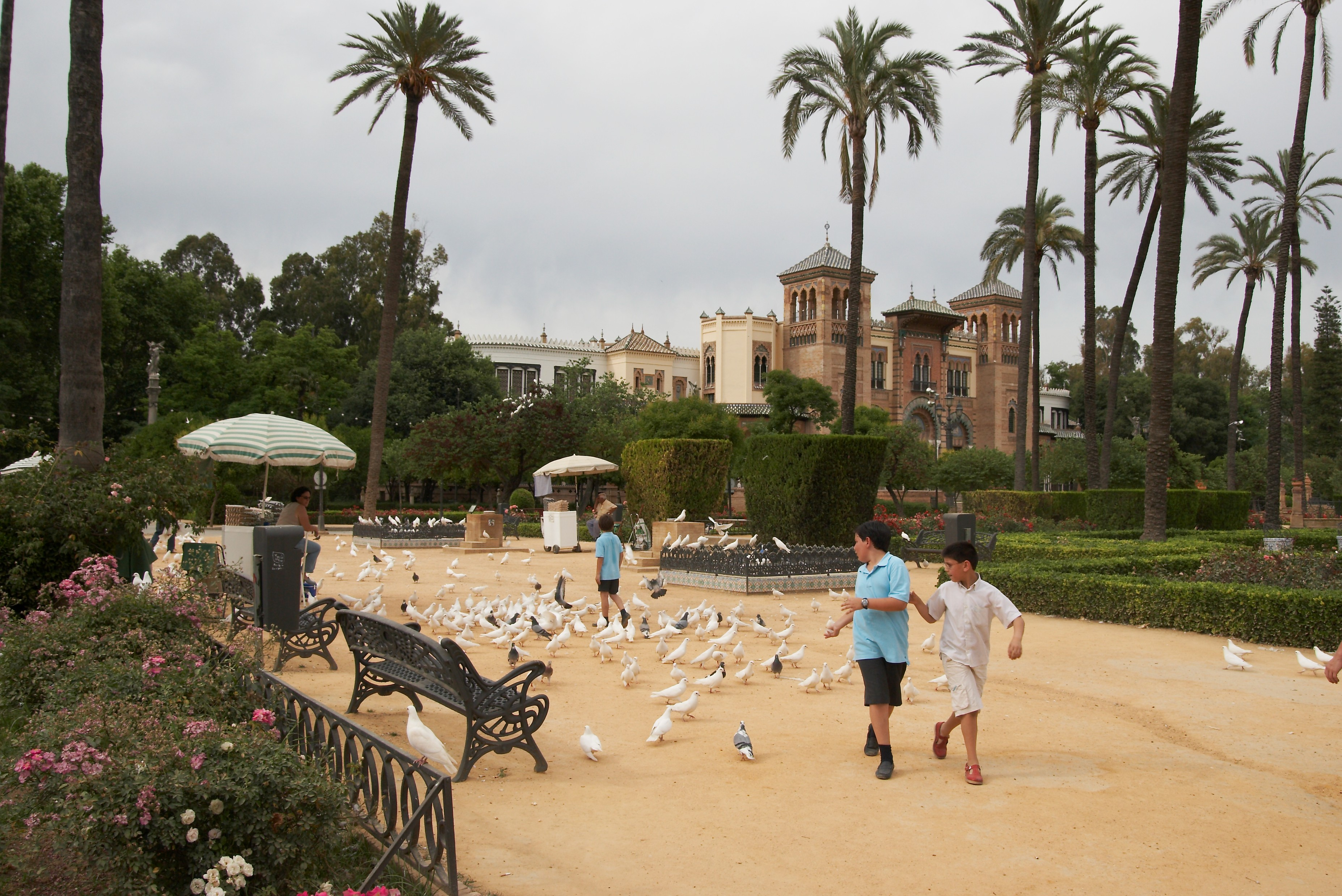 Palomas. Plaza de América, Sevilla, España.